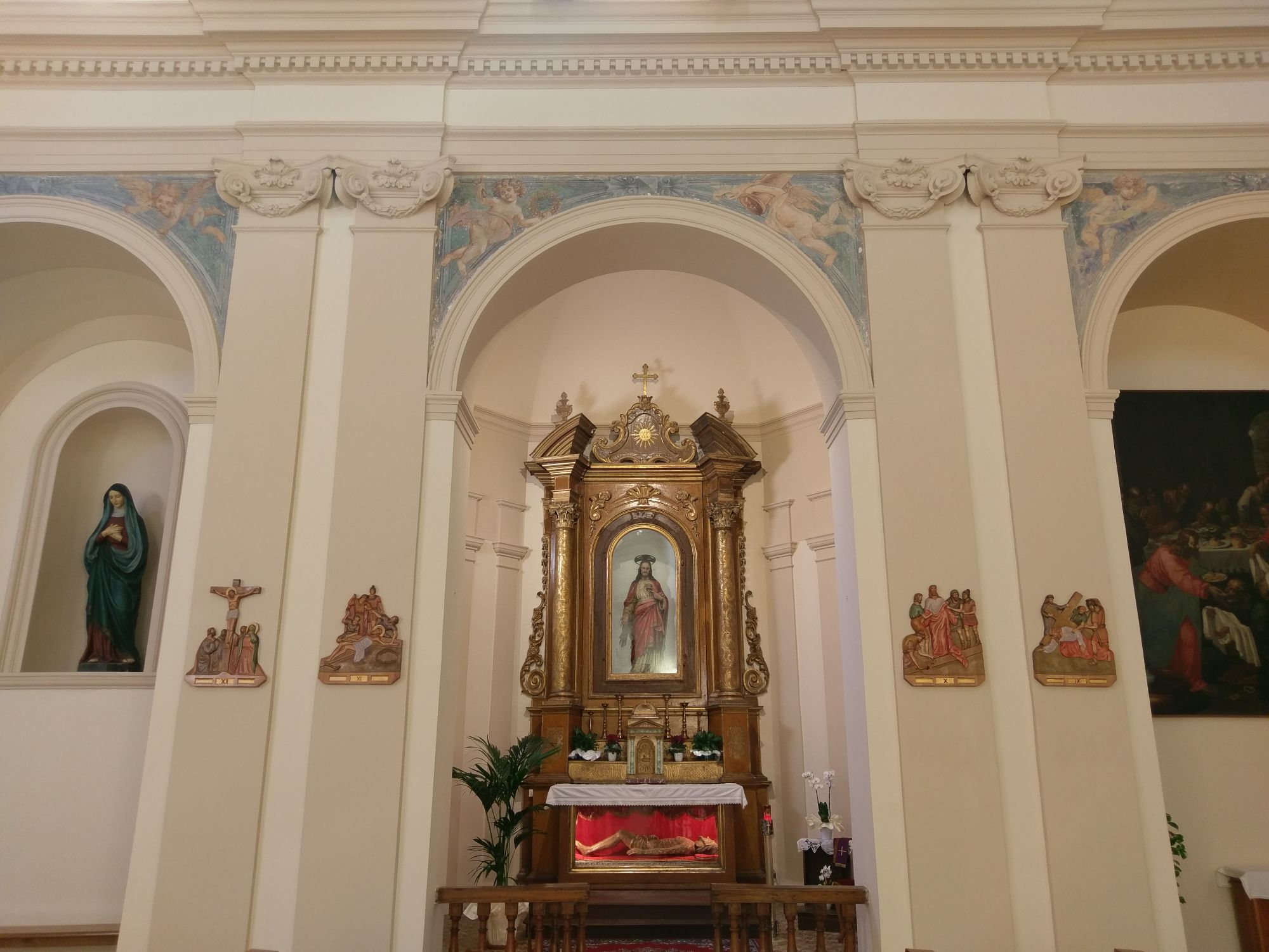 Visuale dell'altare laterale della chiesa di Santa Lucia di Piagge (Terre Roveresche) dopo i restauri del 2019.